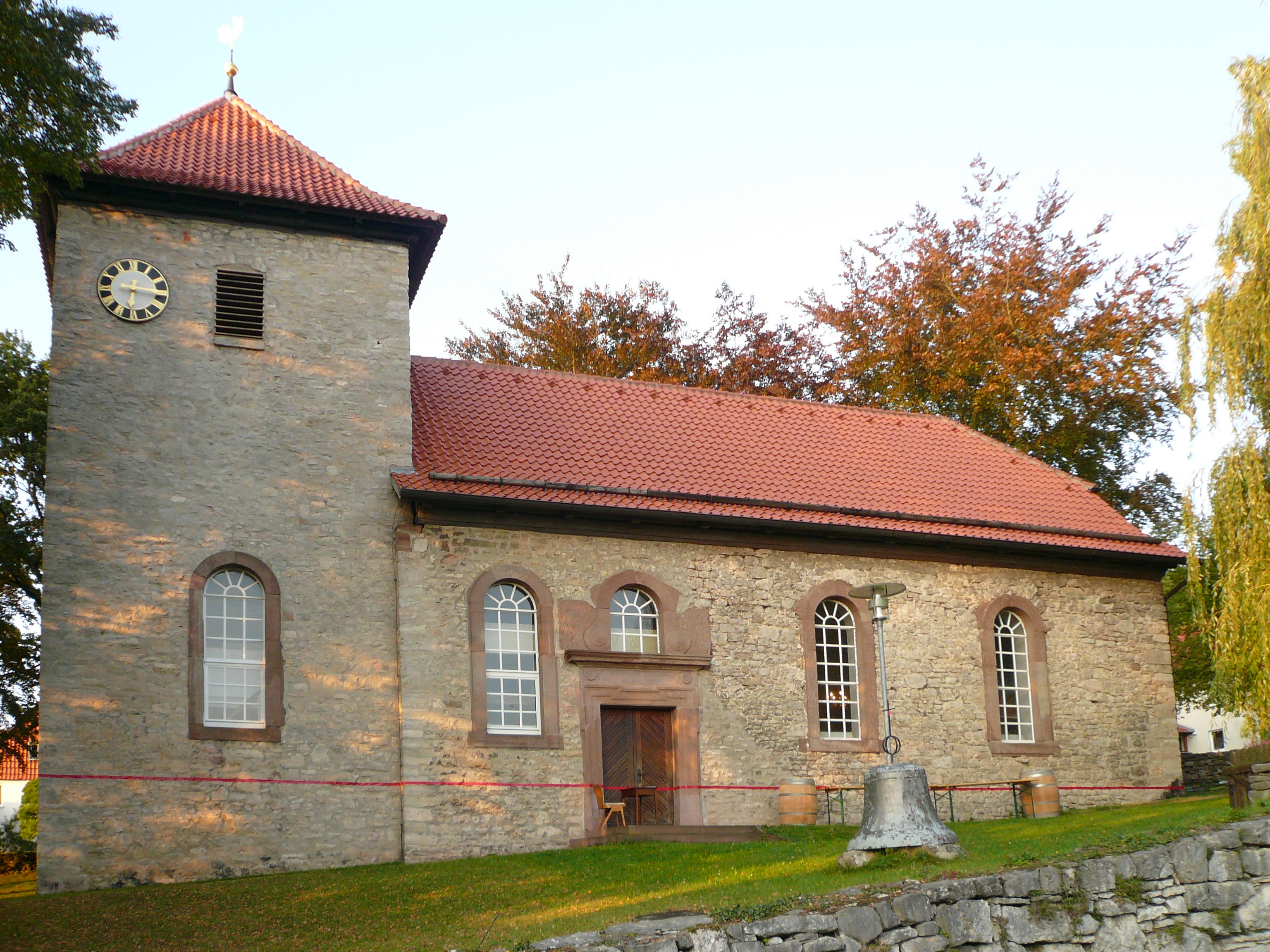 Evangelisch-lutherische St. Martins-Kirche in Roringen, Stadt Göttingen, Niedersachsen, Ansicht von Süden. Kirchturm mittelalterlich, Saal erbaut 1747/48.